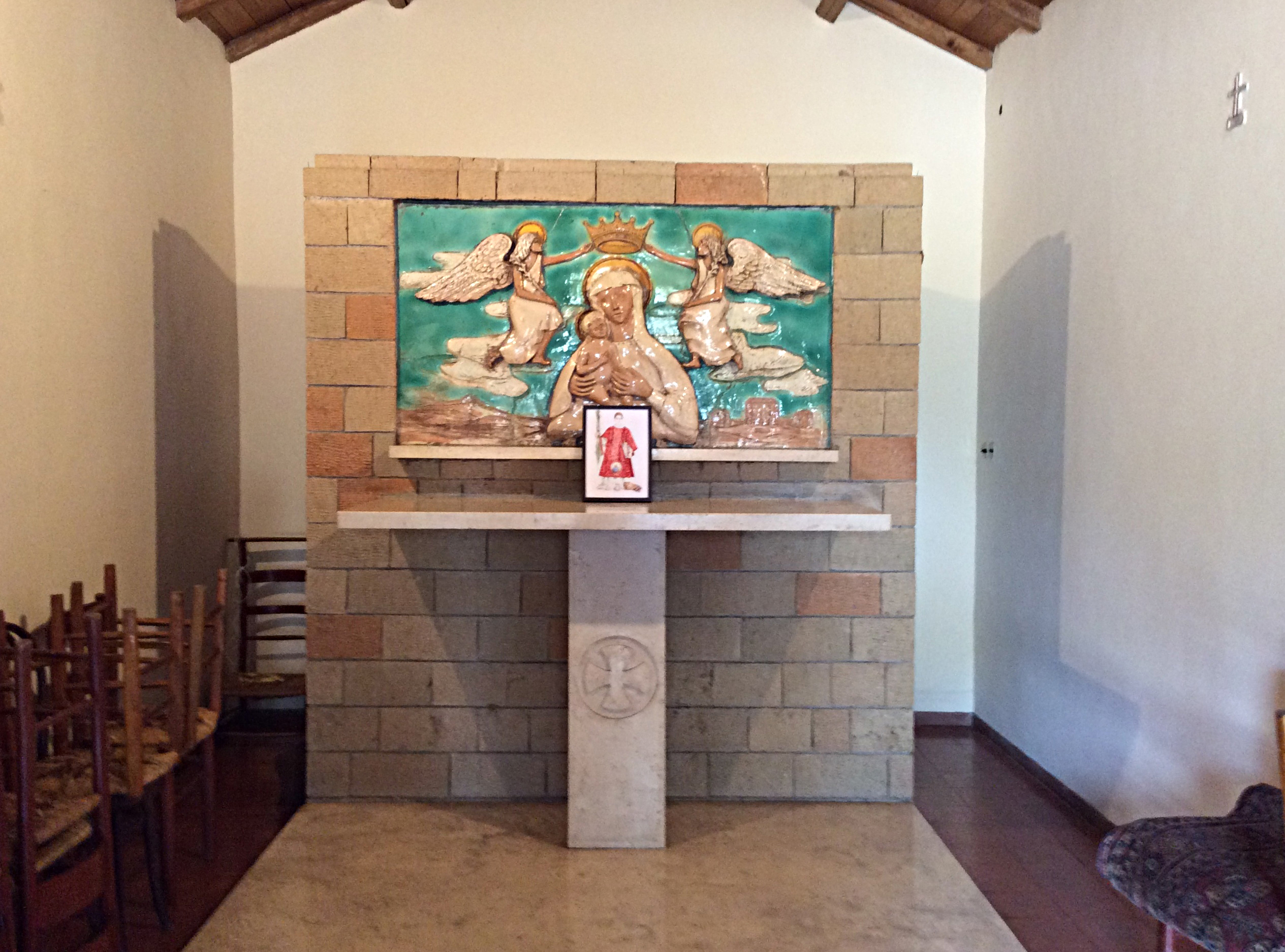 Cappella di San Cesareo diacono e martire, via Ardeatina, Roma